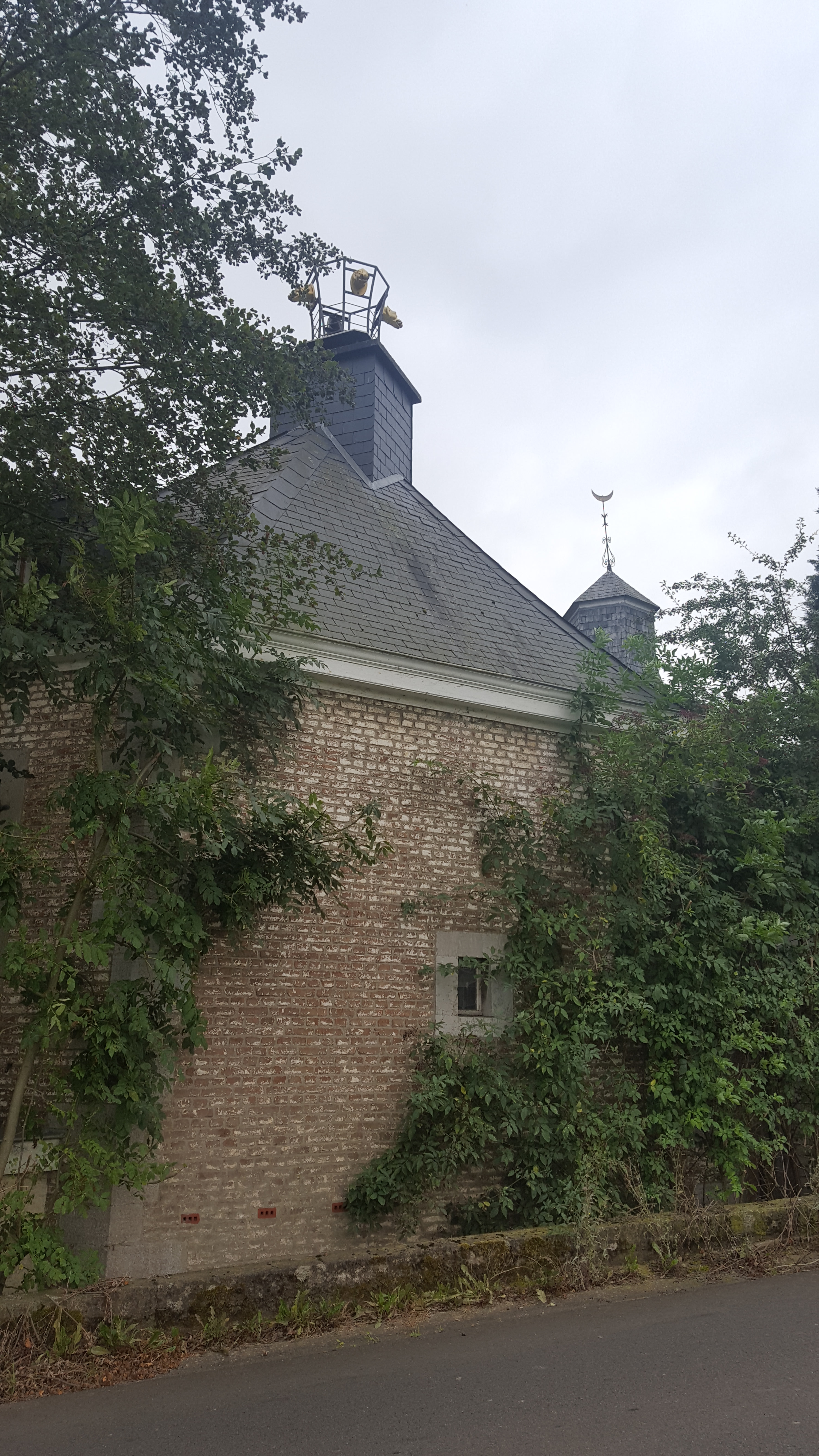 Château de Vreuschemen, Membach, Baelen, Belgique